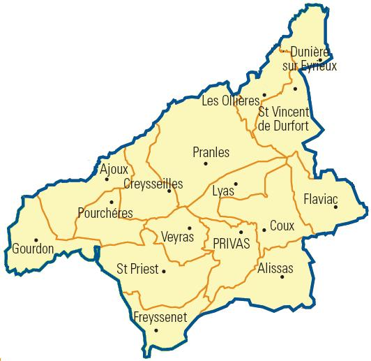 Carte détaillée des communes du canton (Ardèche)